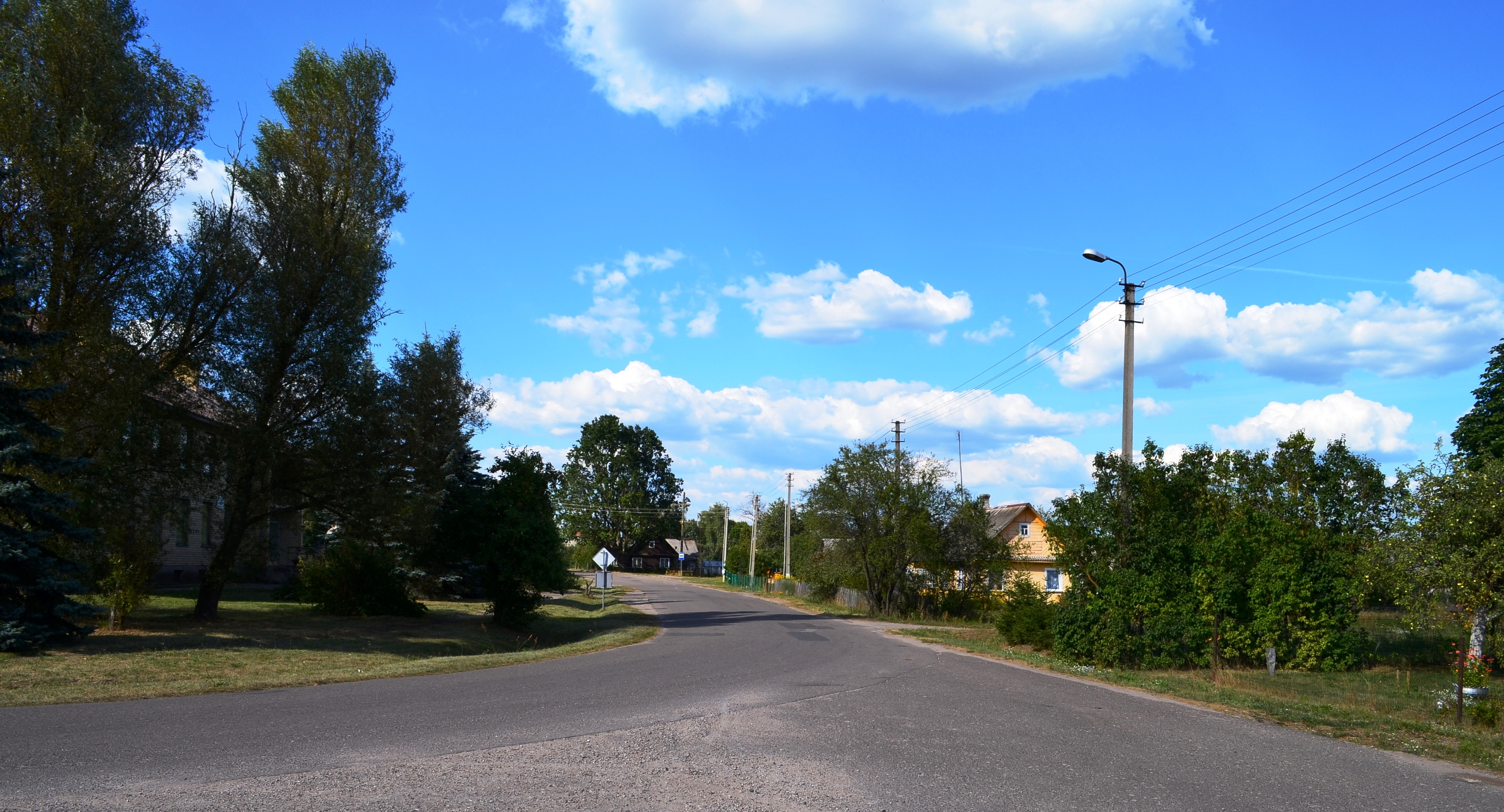 Kabelių ir Grūdos g. kryžkelė, Kabeliai, Varėnos r.